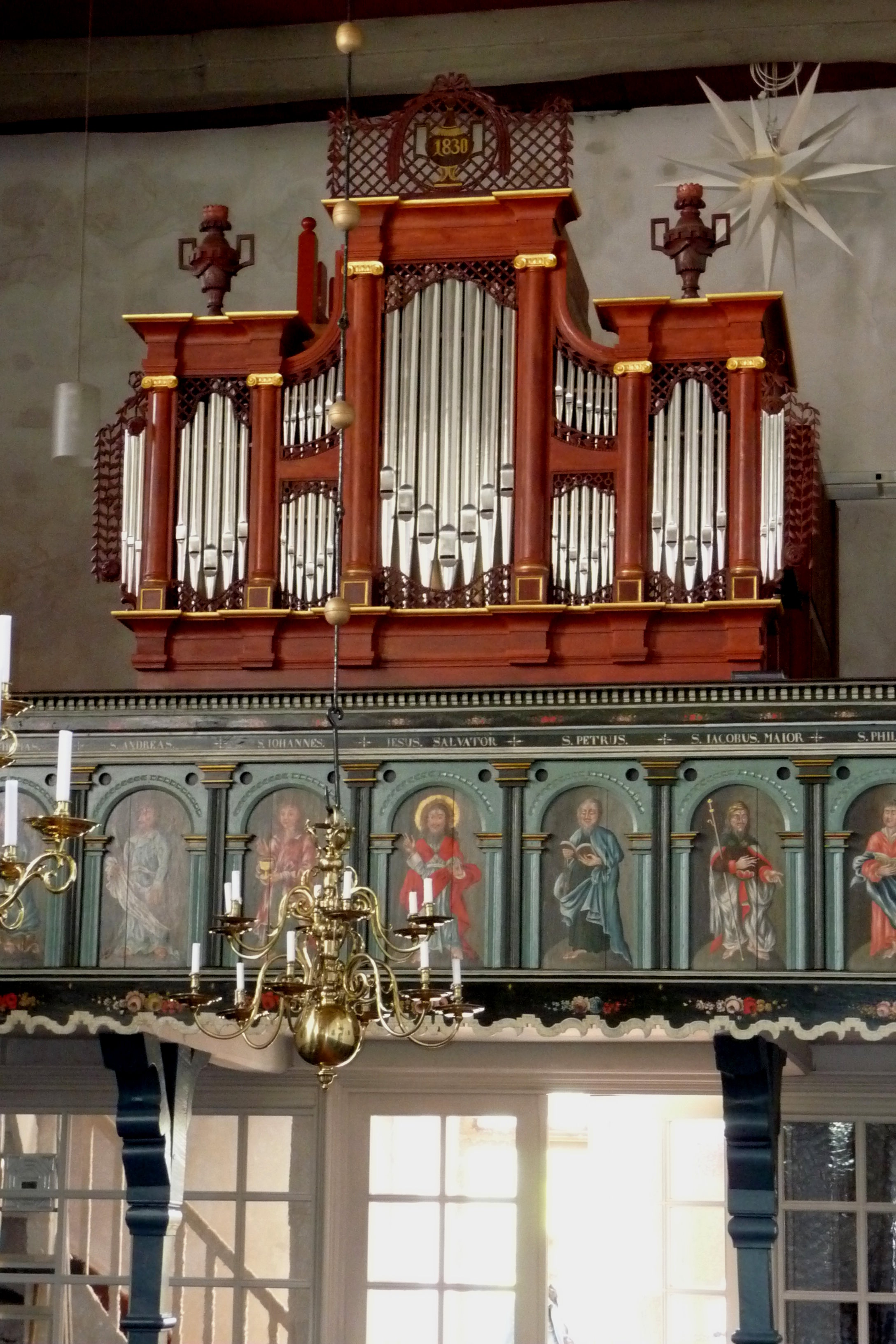 Orgel in Marx